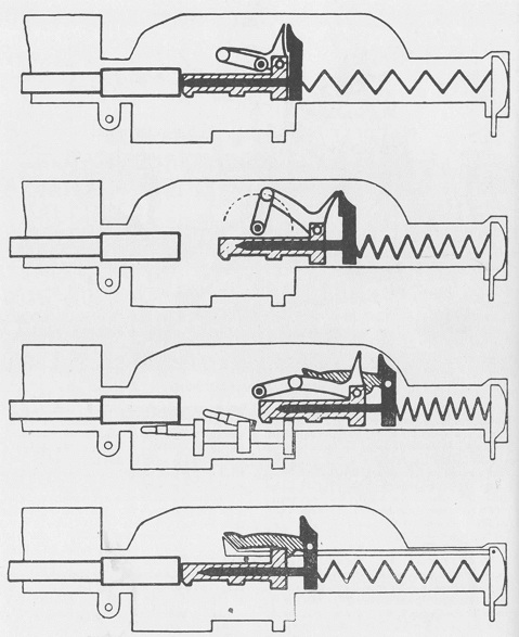 Funktion des Schwarzlose Maschinengewehres